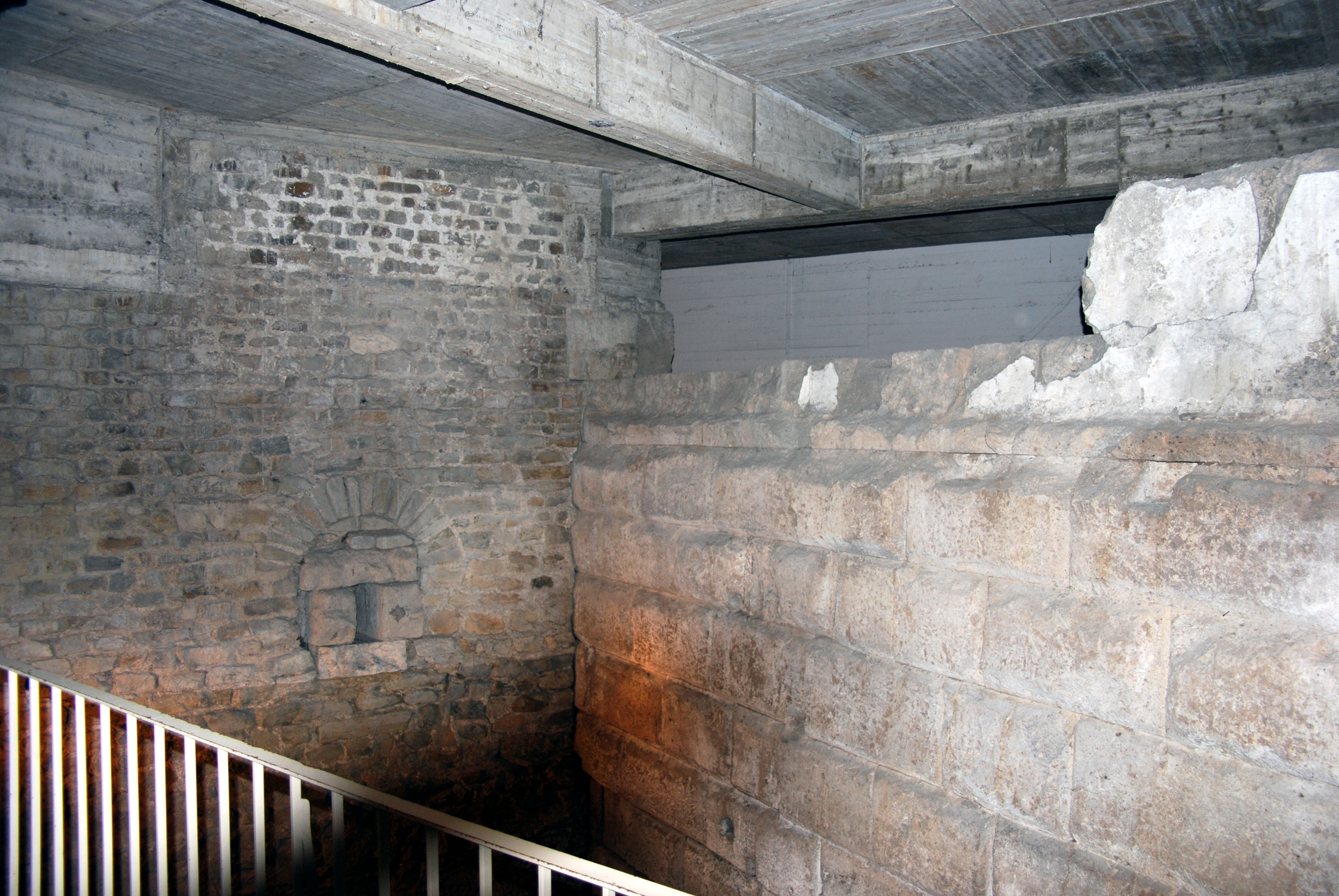 Nordwand des Ubiermonumentes in Köln mit Anschluß an die röm. Stadtmauer